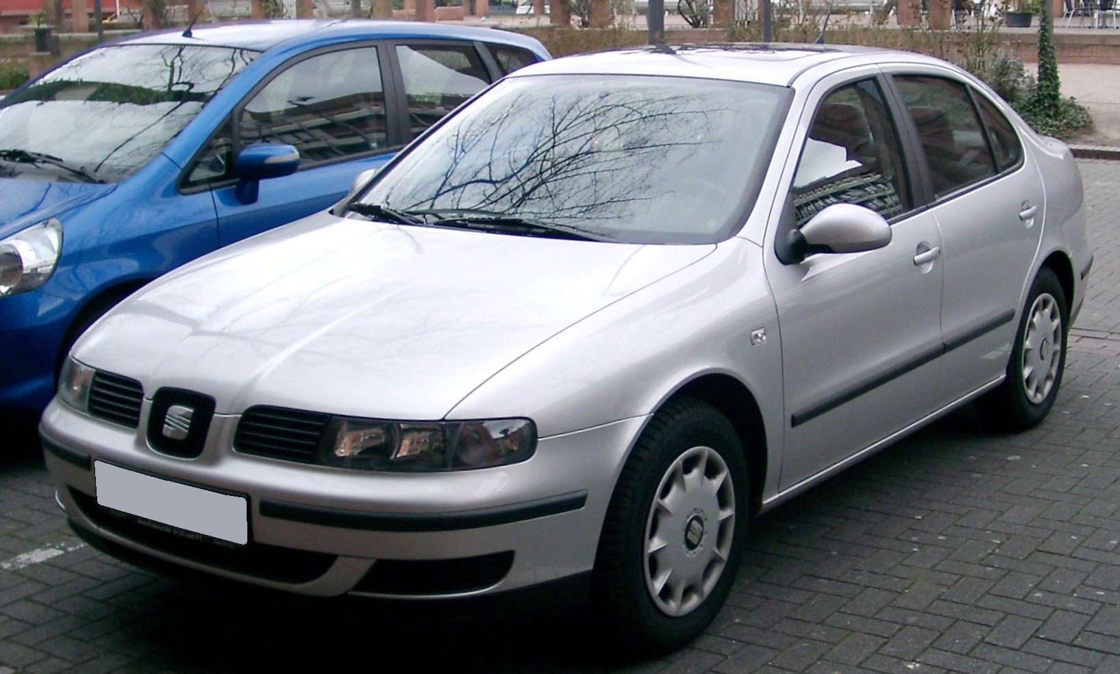 Seat Toledo, 2. Generation